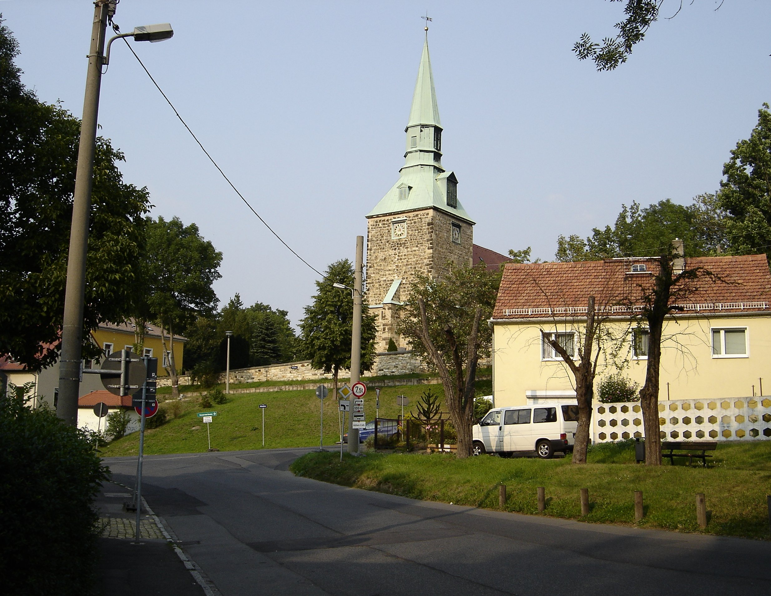 Church in Leubnitz-Neuostra, Dresden